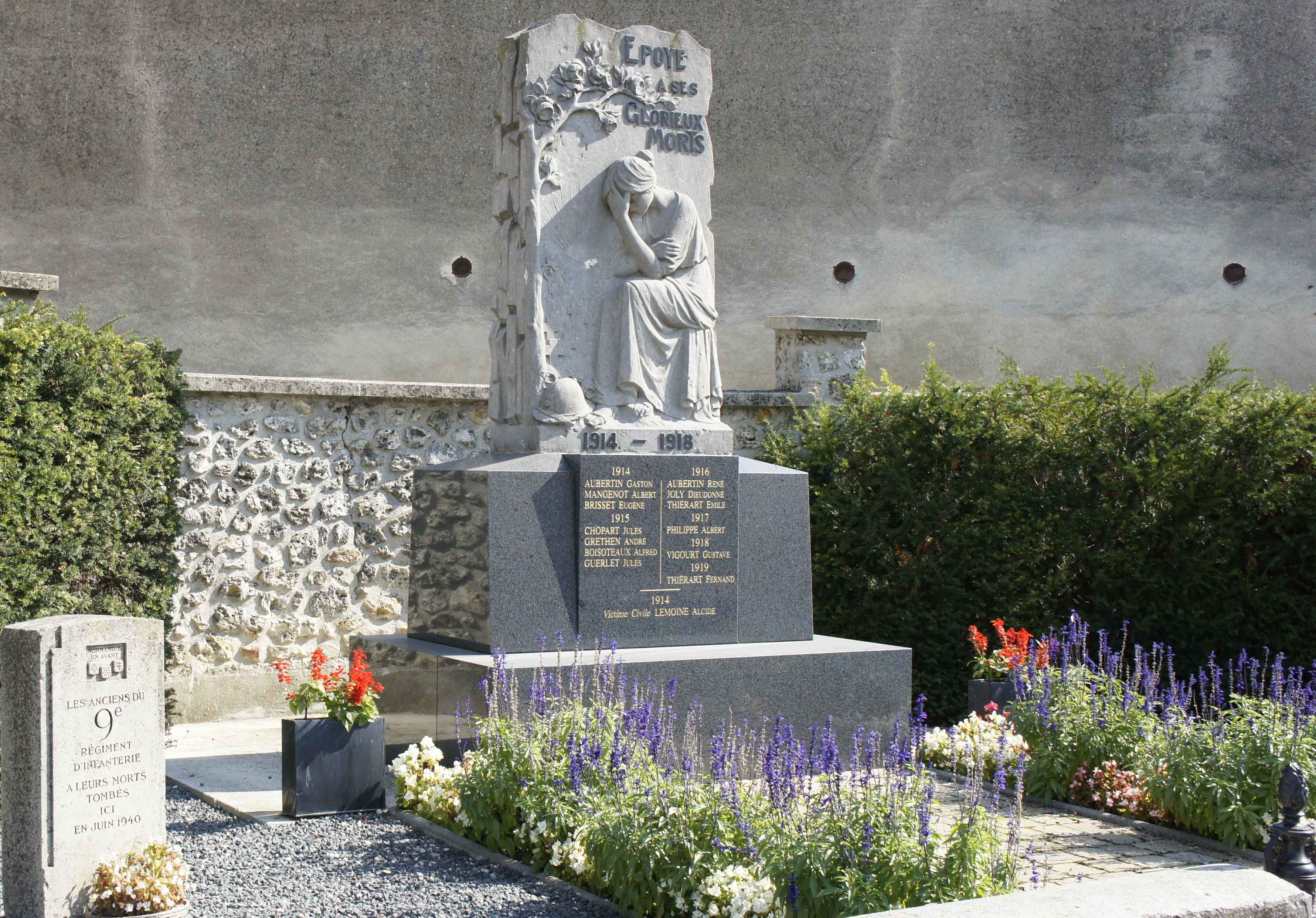 Époye monument aux morts et au 9e régiment d'infanterie en 1940.